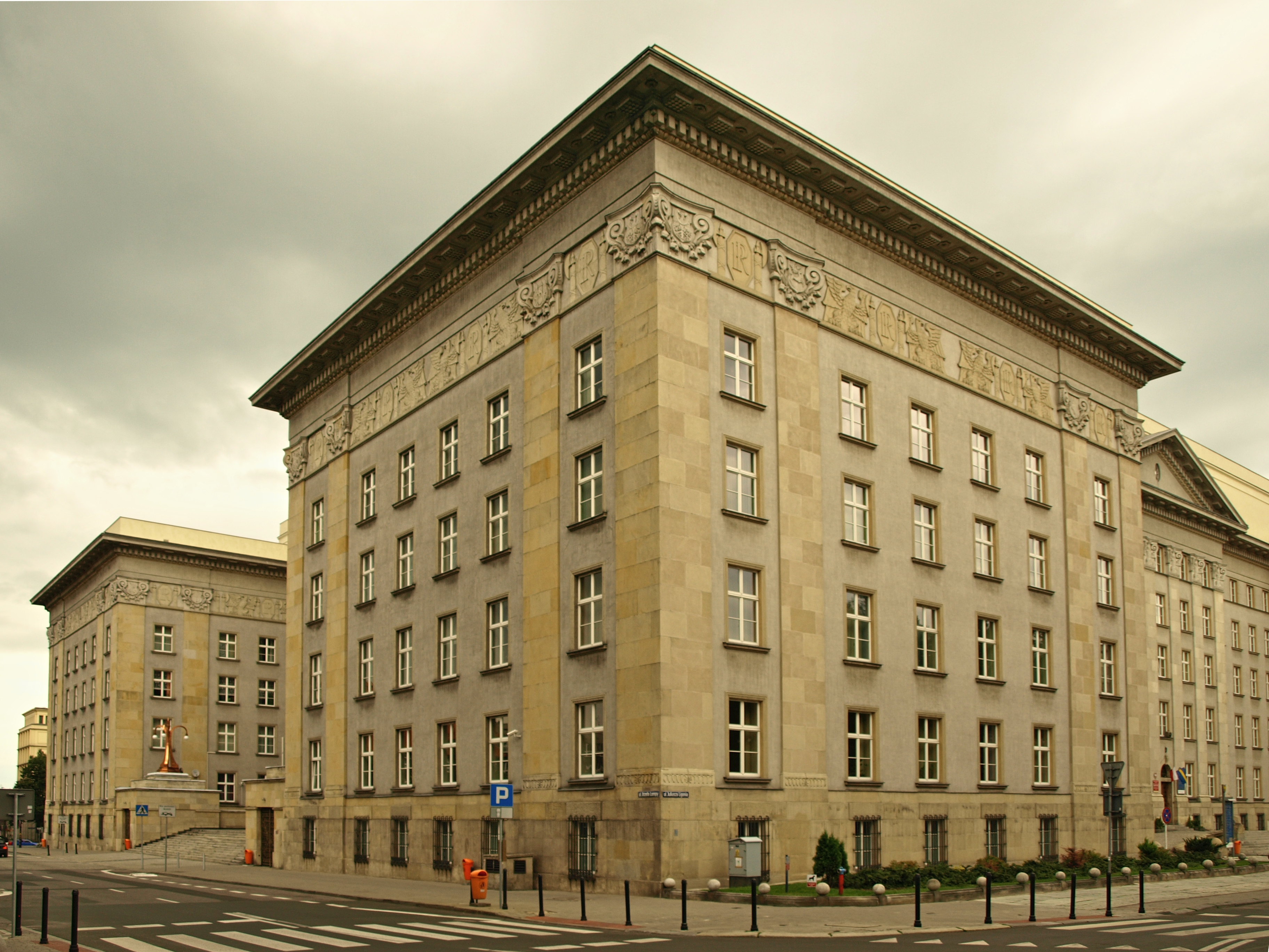 Gmach Urzędu Wojewódzkiego i Sejmu Śląskiego; Katowice, ul. Jagiellońska 25, Katowice